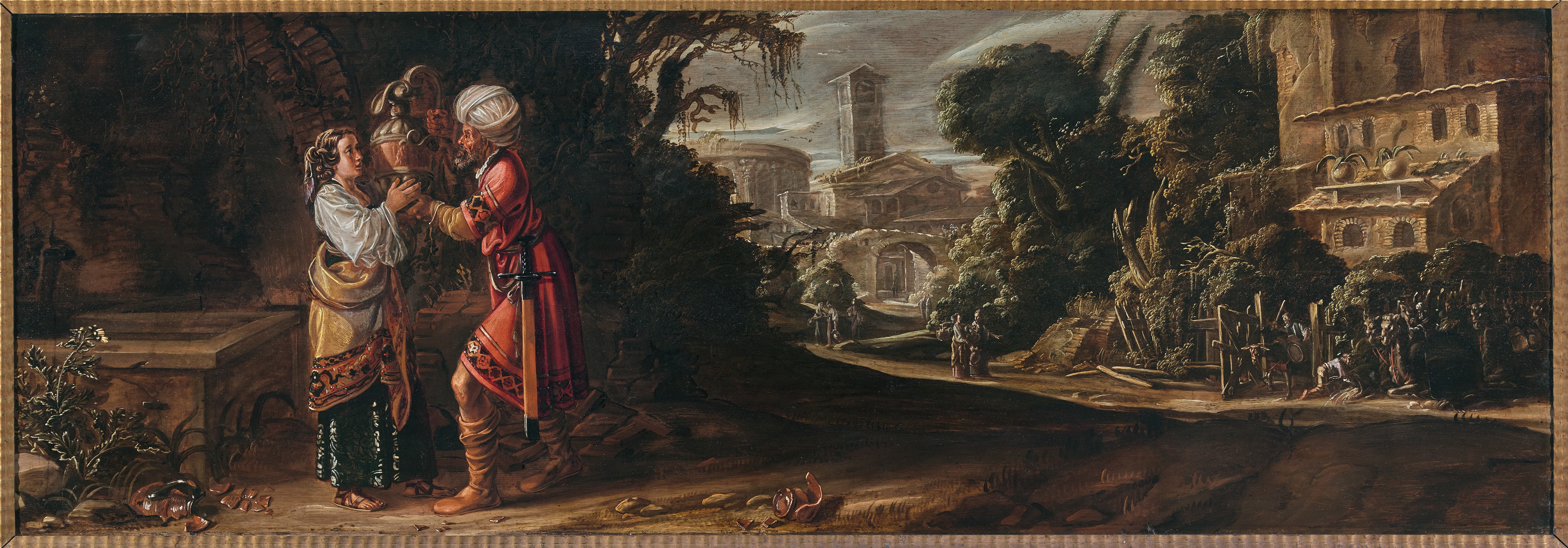 Rebekka en Eliziër bij de put Jan Tengnagel ca.1612 Paneel Olieverf 57x166,5 cm Ger Eenens Collection the Netherlands on long term loan to the Rembrandthuis Amsterdam